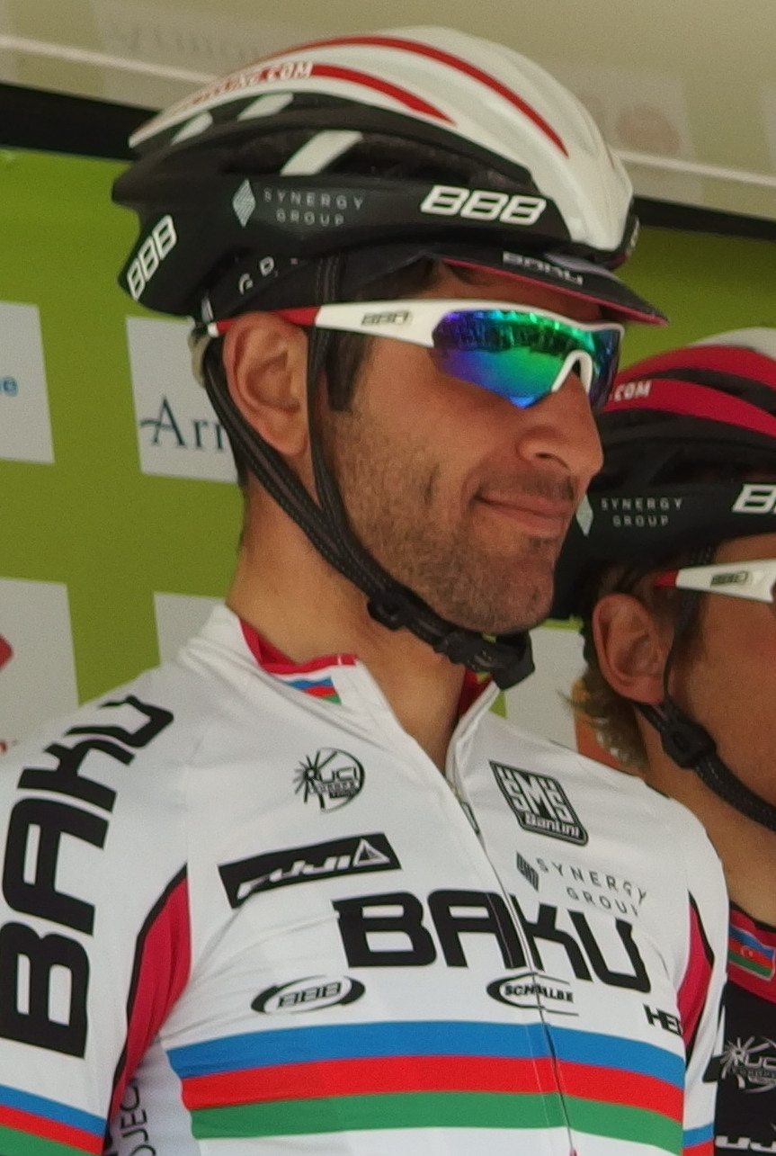 Tour de Bretagne 2015 - Présentation des équipes au départ de la troisième étape à Baud - Équipe Synergy Baku Project Depicted person: Elchin Asadov